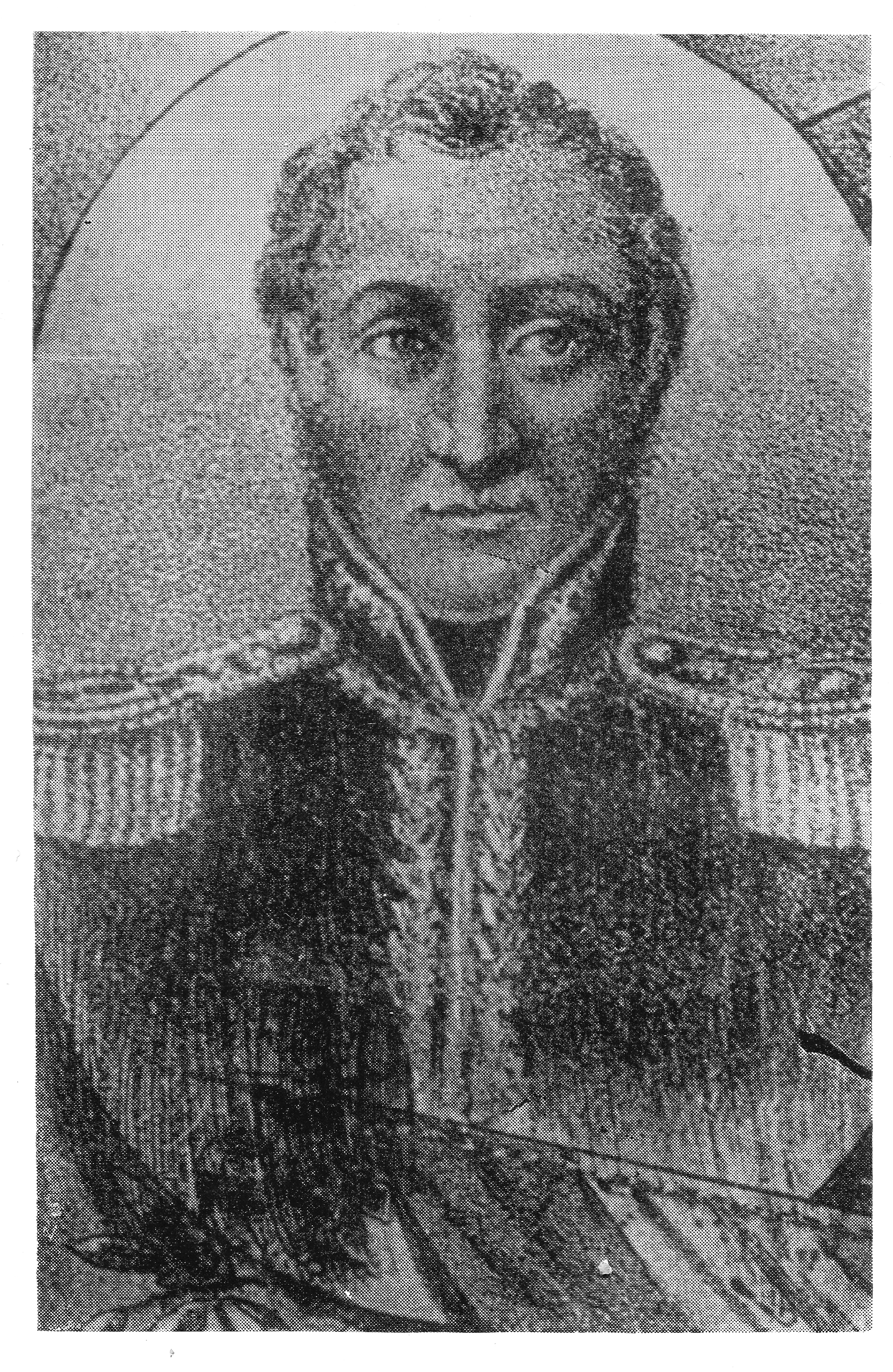 Juan Ramón Balcarce, ex gobernador de la provincia de Buenos Aires, Argentina